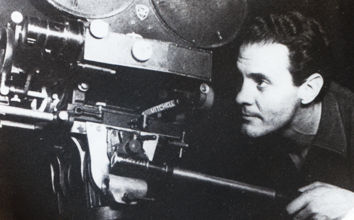 El cineasta argentino Hugo Fregonese